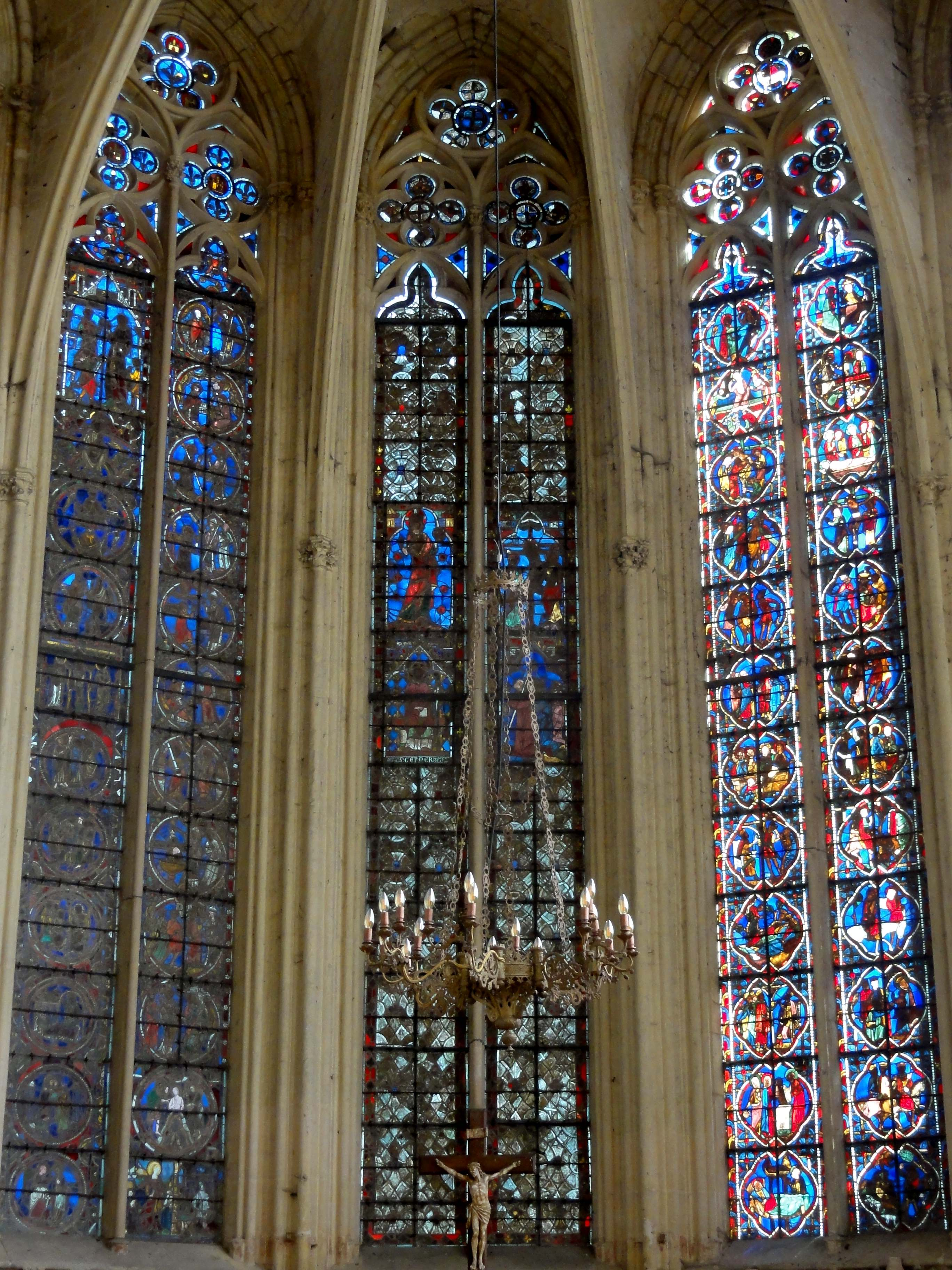 Vitraux classés de l'abside de la chapelle de la Vierge (Sainte-chapelle) du XIIe, XIIIe et XVIe siècle - voir le titre du fichier.